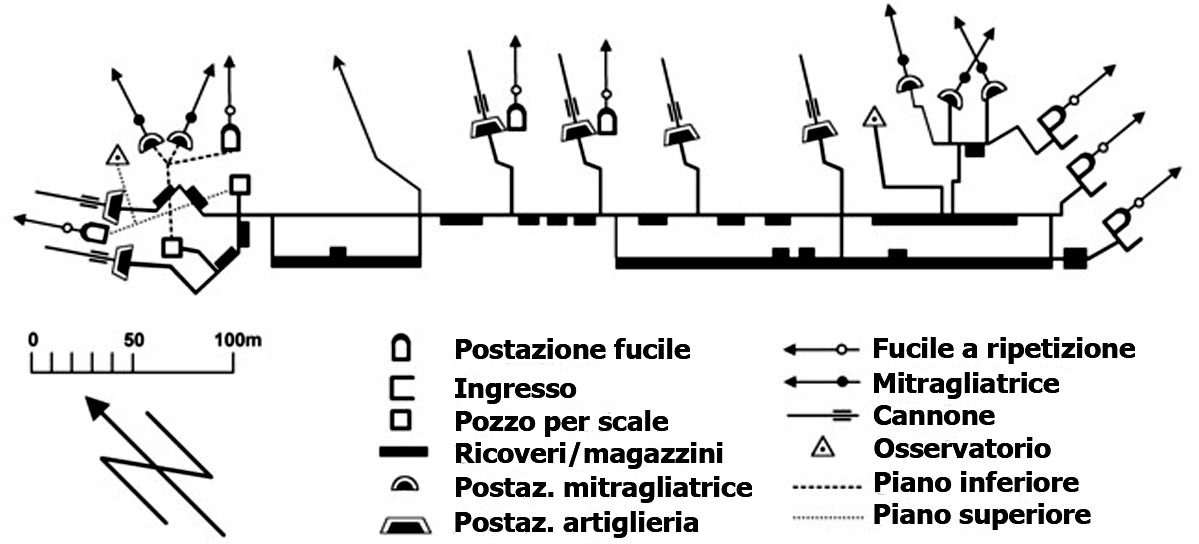 piantina Opera 10, Passo monte croce comelico , Alto Adige, Italia. Uploaded first to Italian Wikipedia: Author : Istituto Geografico Militare Source: Alessandro Bernasconi; Giovanni Muran, Il testimone di cemento - Le fortificazioni del "Vallo Alpino Littorio" in Cadore, Carnia e Tarvisiano (in italiano), Udine, editore La Nuova Base Editrice [maggio 2009], 498 pagine + CD con allegati storici e tecnici. ISBN 86-329-0394-2 License / Licenza: GNU